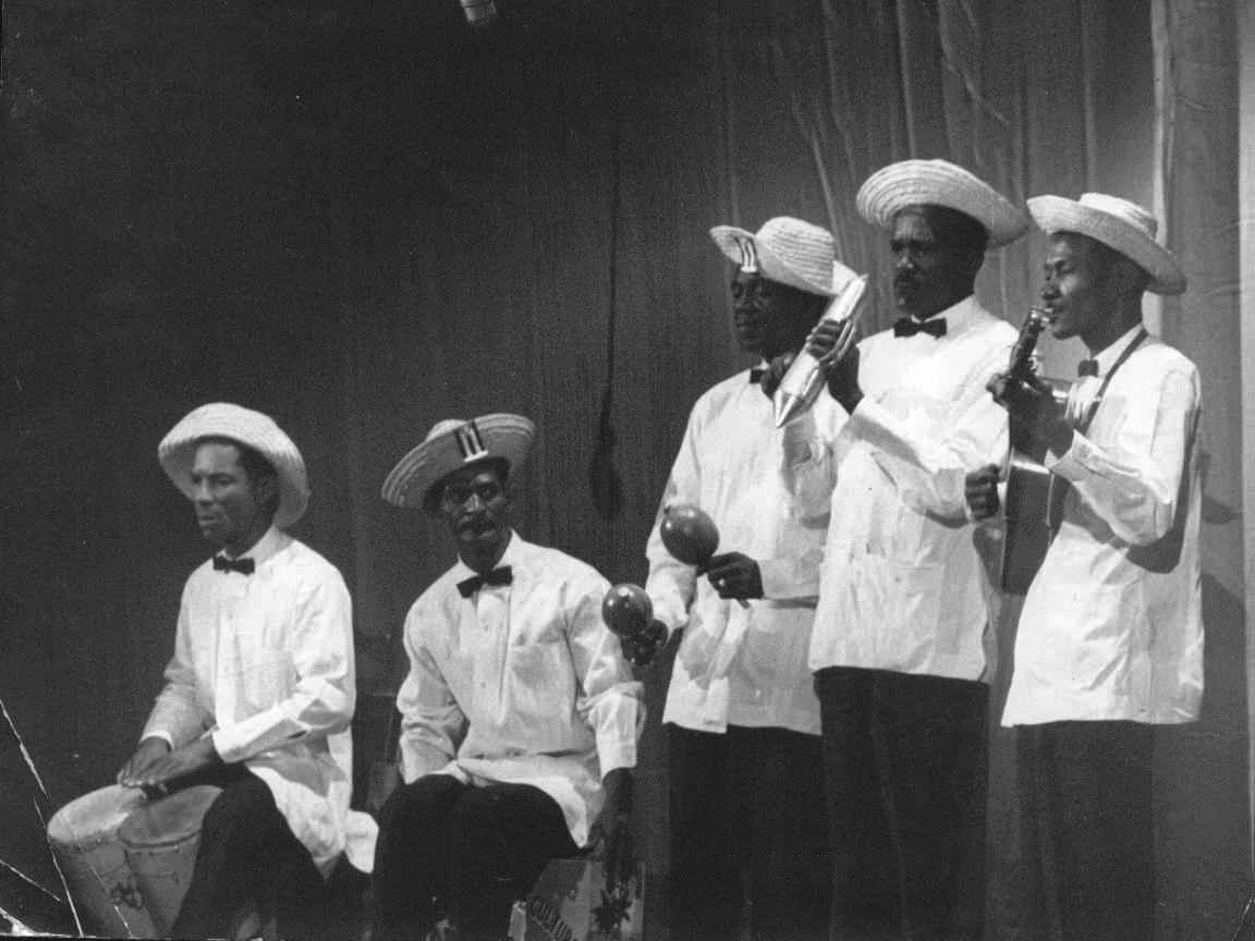 Grupo Changüí Guantánamo at the Festival Nacional de Agrupaciones Folklóricas, Havana, 1962.